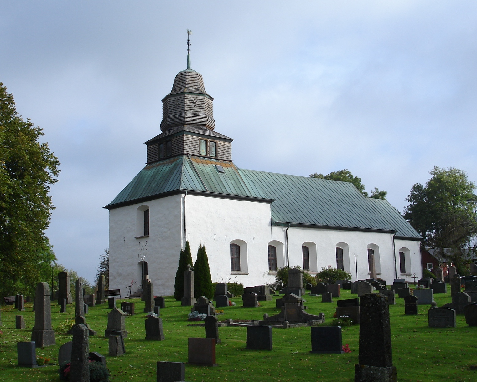 Slättåkra kyrka, Halmstads kommun